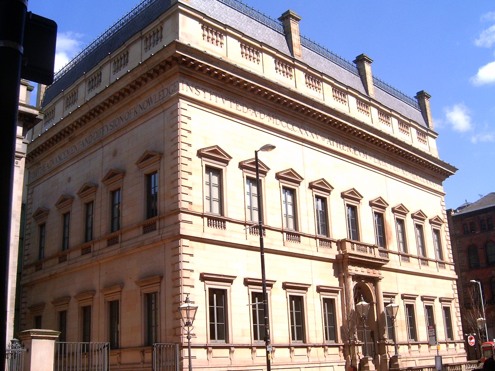 Manchester Art Gallery